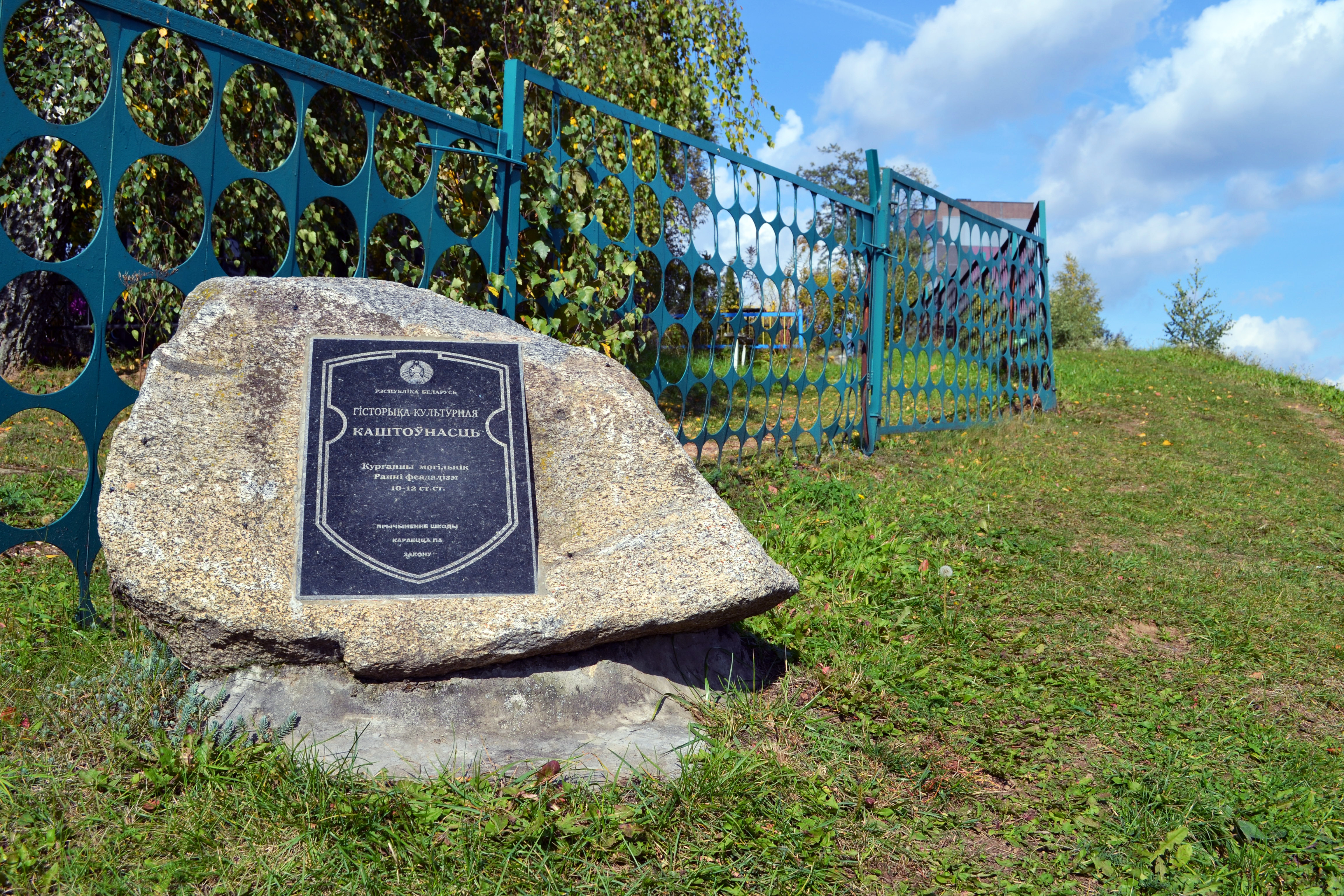 Беларуская (тарашкевіца): Курганны могільнік у менскім мікрараёне Сухарава, на скрыжаваньні вул. Янкоўскага з вул. Р. Шырмы This is a photo of Belarusian heritage monument. Reference number: 713В000245 ( WLM)